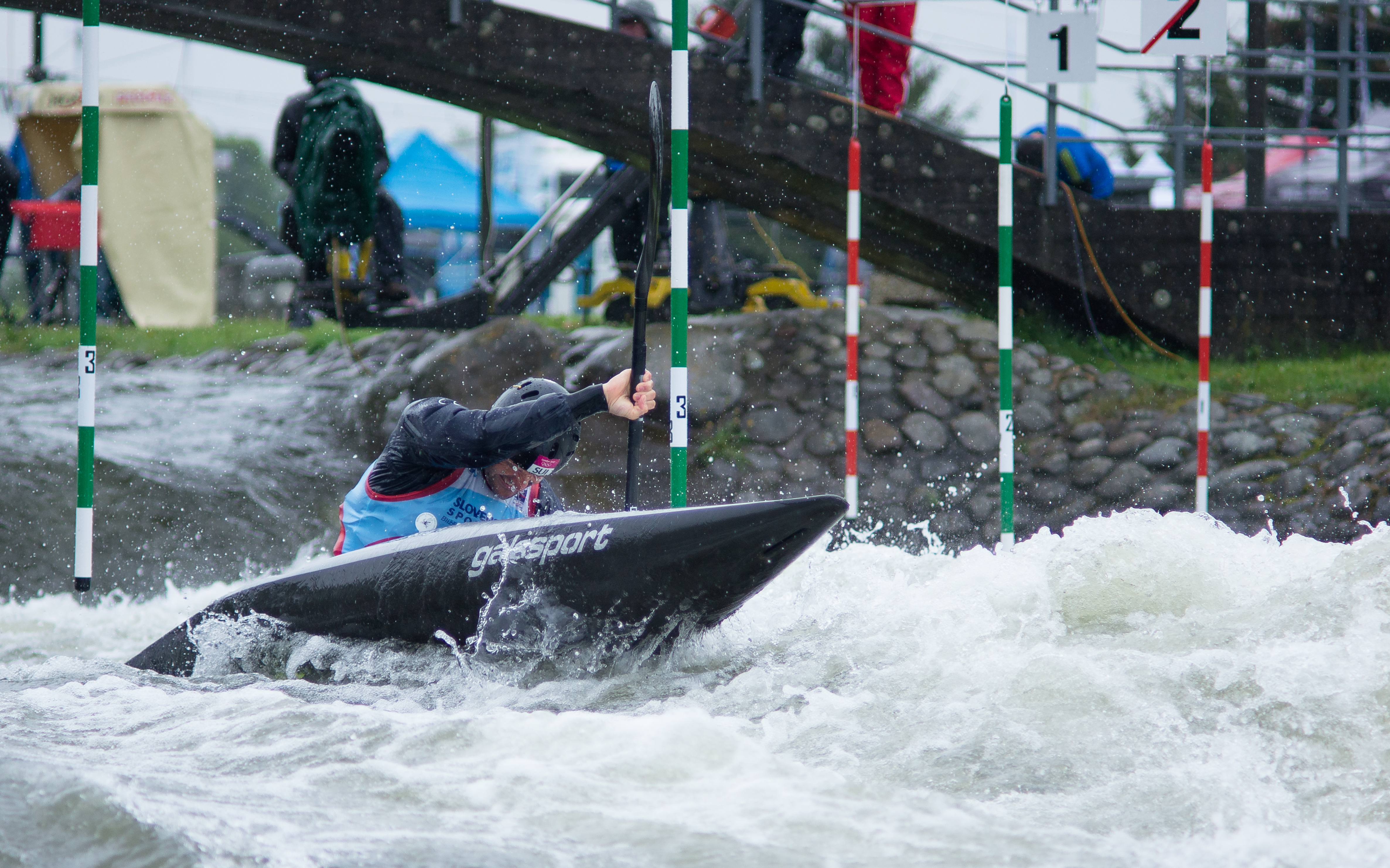 Michael Kurt